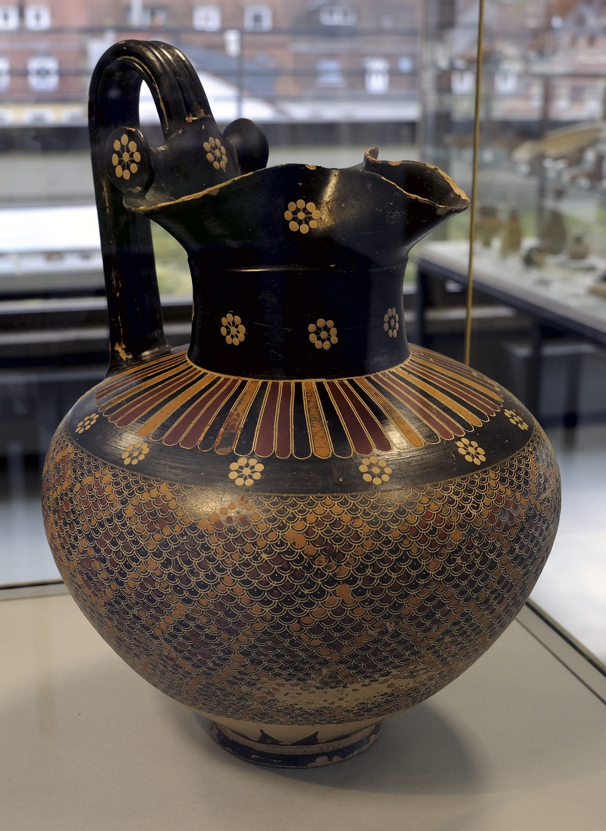 Protokorinthische Oinochoe im Antikenmuseum der Universität Heidelberg. Inventarnummer 96/4.